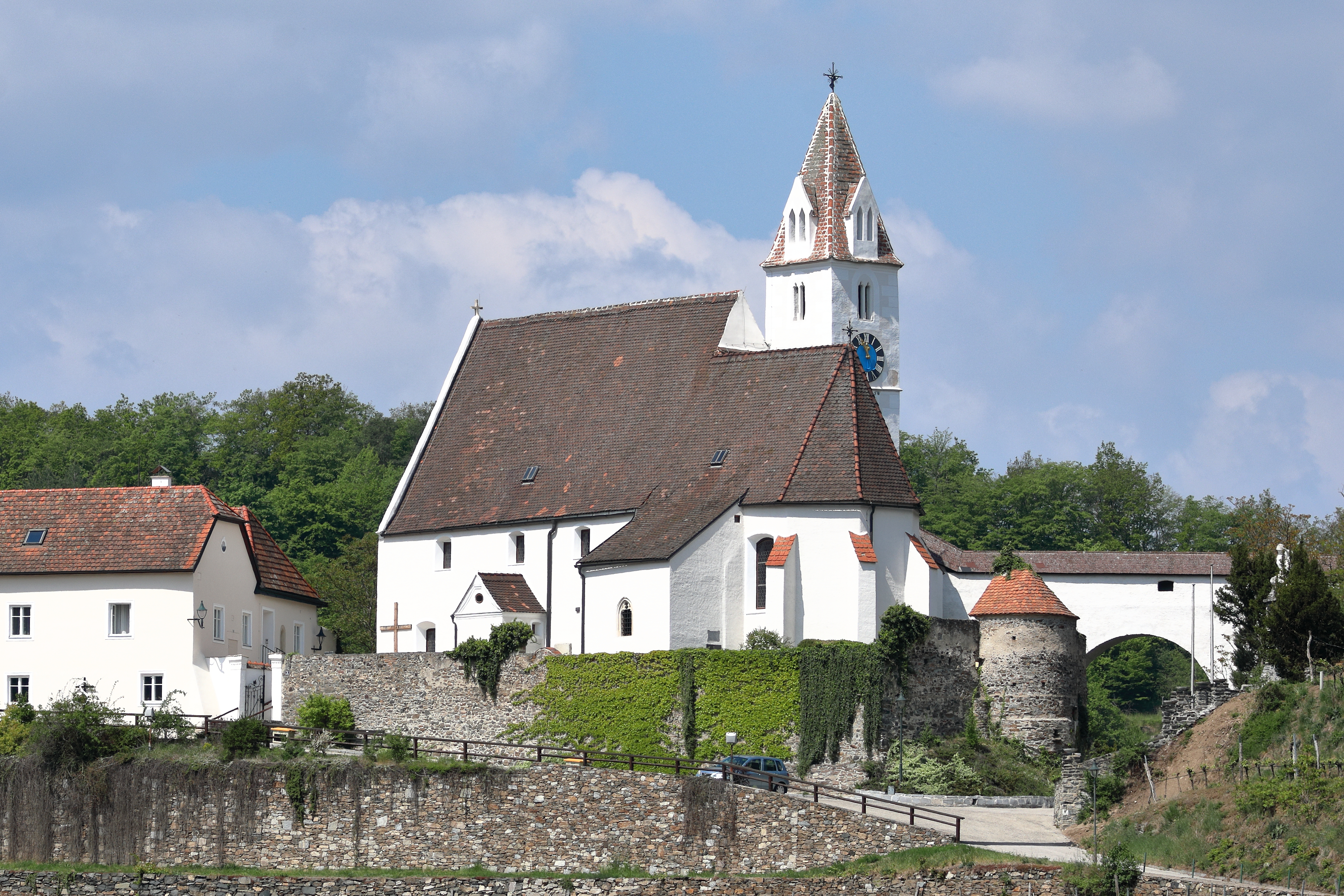 Ostsüdostansicht der röm.-kath. Pfarrkirche hl. Andreas in der niederösterreichischen Marktgemeinde Senftenberg. Die mittelalterliche Wehrkirche entstand in mehreren Bauphasen zwischen dem 12. Jahrhundert und der ersten Hälfte des 16. Jahrhunderts.